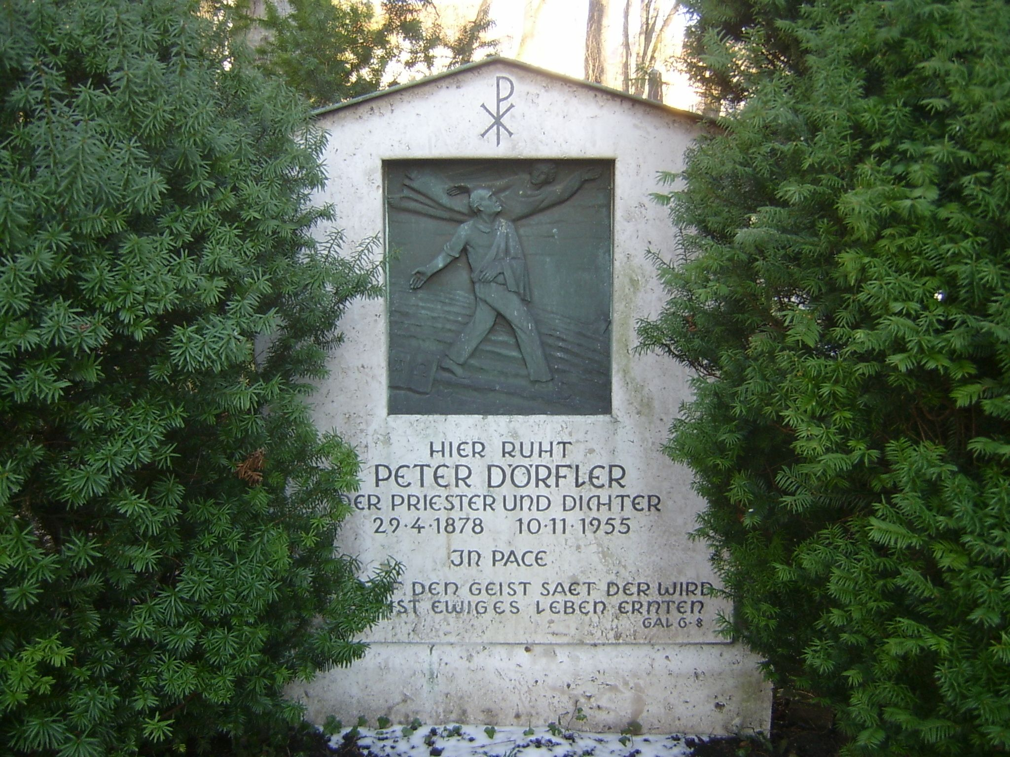 Grab von Peter Dörfler auf dem Winthirfriedhof, München